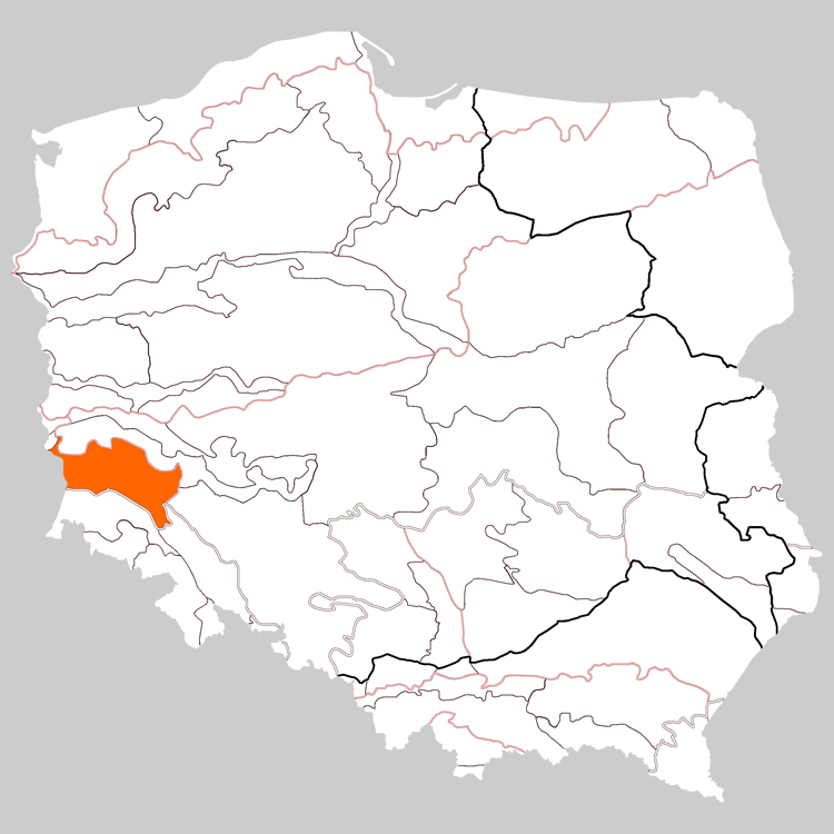 Physico-geographical regionalization of Poland Macroregion 317.7 Silesian-Lusatian Lowland Regionalizacja fizycznogeograficzna Polski Makroregion 317.7 Nizina Śląsko-Łużycka